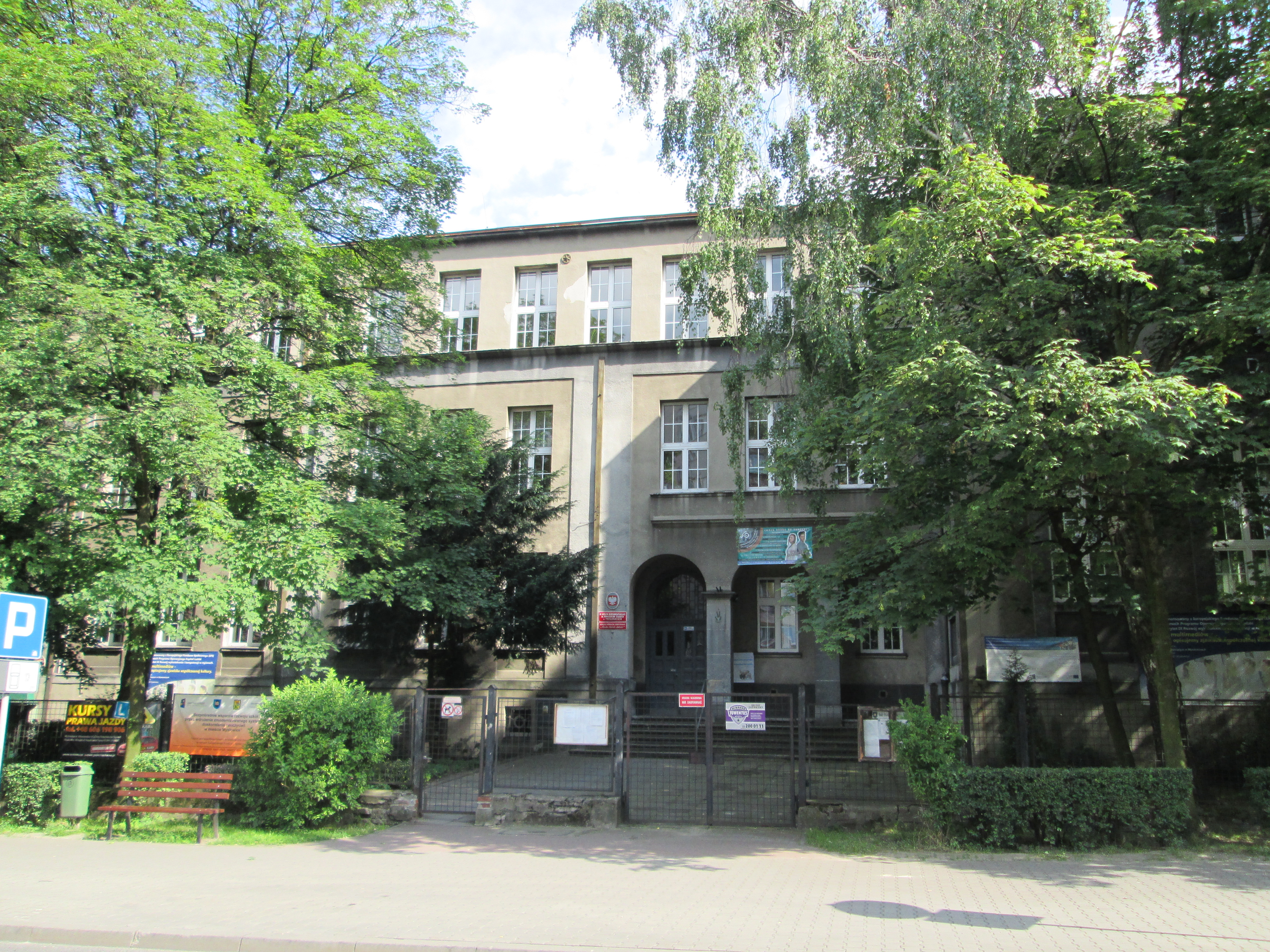 Mysłowice, gmach II Liceum Ogólnokształcącego